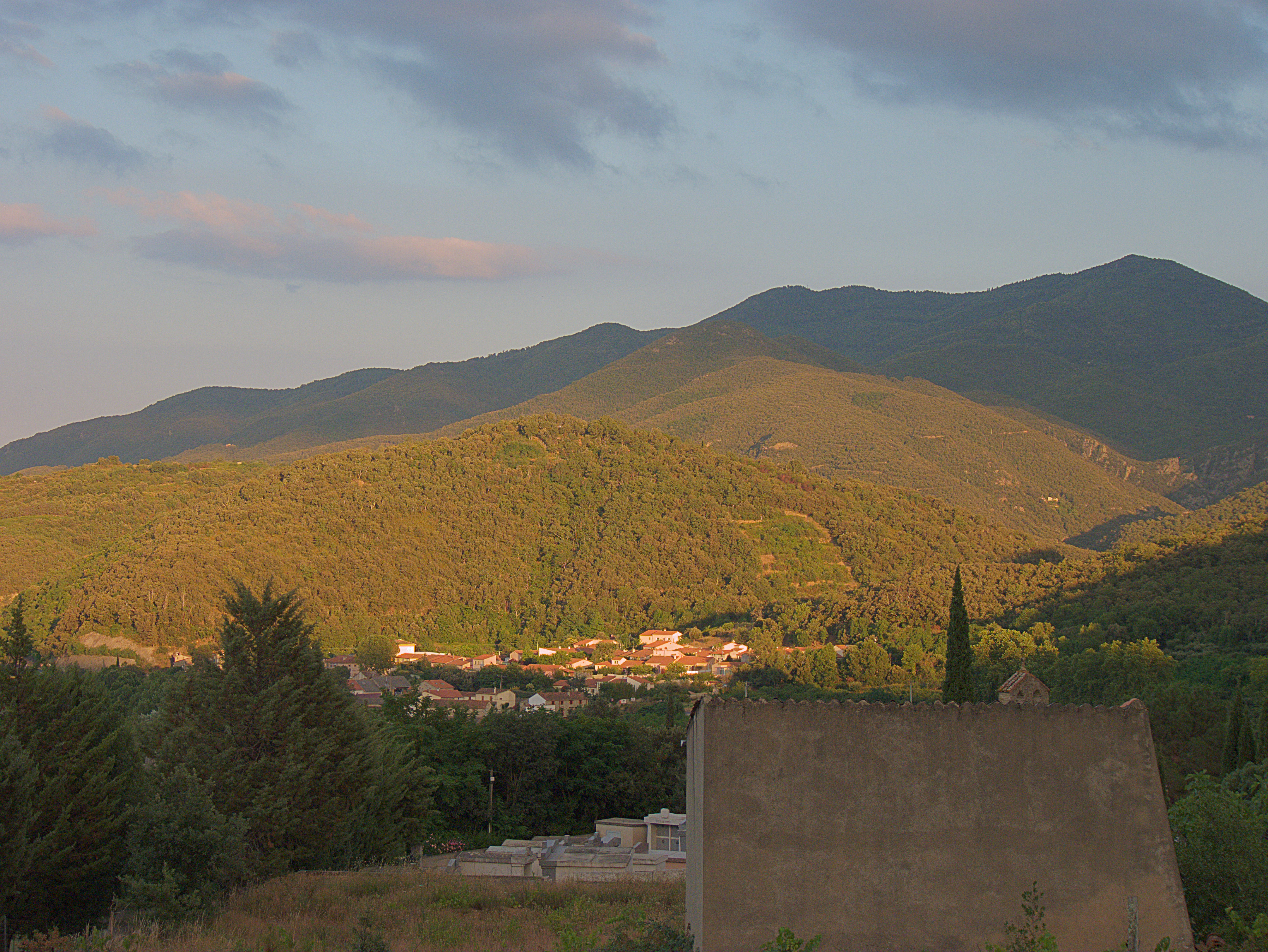 Poux d'En Carol photographié depuis le Vila, Le Pont, Reynès (Pyrénées-Orientales, Languedoc-Roussillon, France)